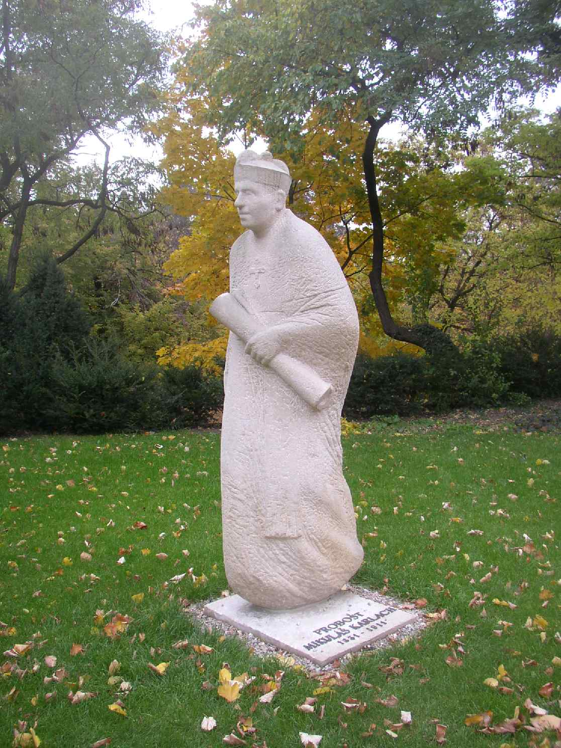 Statue of provost Mikuláš Karlach (1831-1911) by Pavel Malovaný (2003) in Karlach Park, Vyšehrad, Prague, Czech Republic. Socha probošta Mikuláše Karlacha (1831-1911) od Pavla Malovaného zdobí od roku 2003 Karlachovy sady na pražském Vyšehradě. Photo taken by Miaow Miaow in October 2005, PD-self